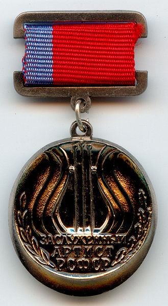 Medal Narodowy Artysta RFSRR